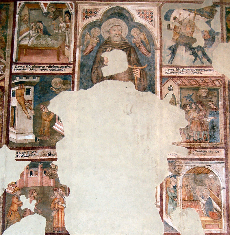 Storie della Vita di San Gherardo di Villamagna, affresco del XIV secolo posto nella Pieve dei Santi Leonardo e Cristoforo a Monticchiello (Pienza)